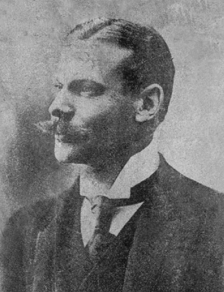 André Siegfried, Buste, 3/4 à g.